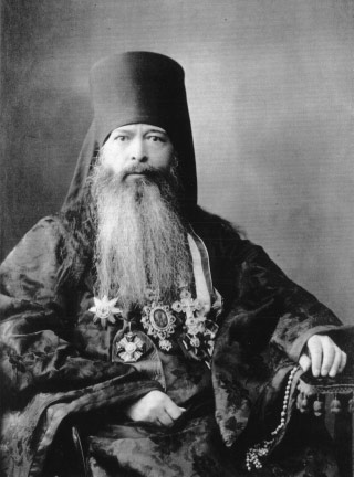 Архиепископ Нижегородский и Арзамасский Иоаким